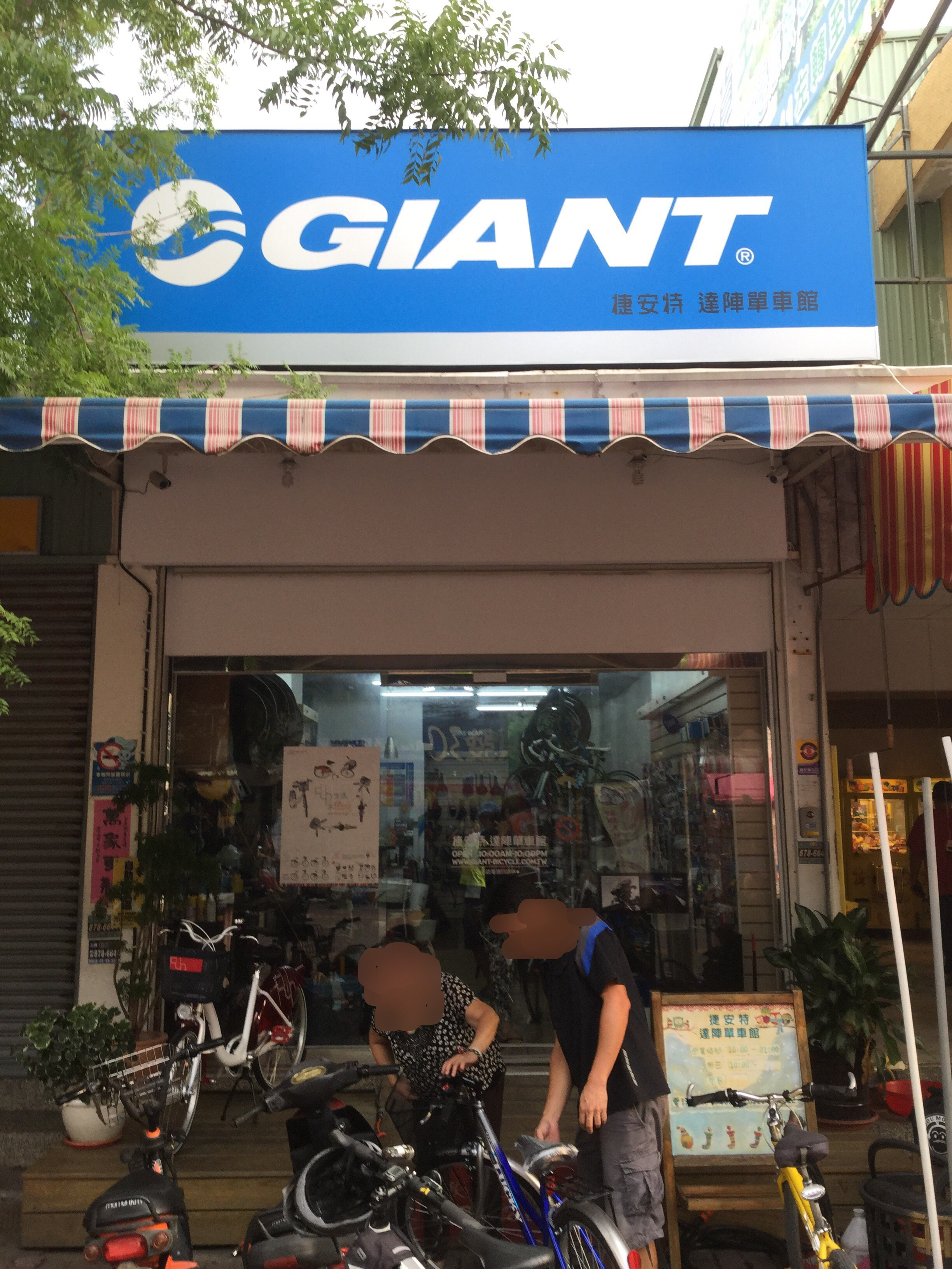 捷安特租賃自行車店於屏東枋寮